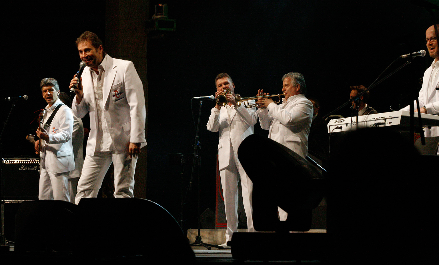 Das Nockalm Quintett mit der Musikantenstadl-Tournee in der Wiener Stadthalle.